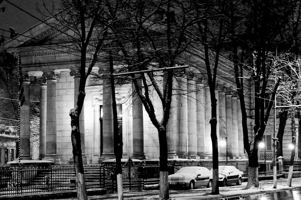 Fotografia prezinta Biserica Greceasca din Bucuresti, pe timp de noapte.